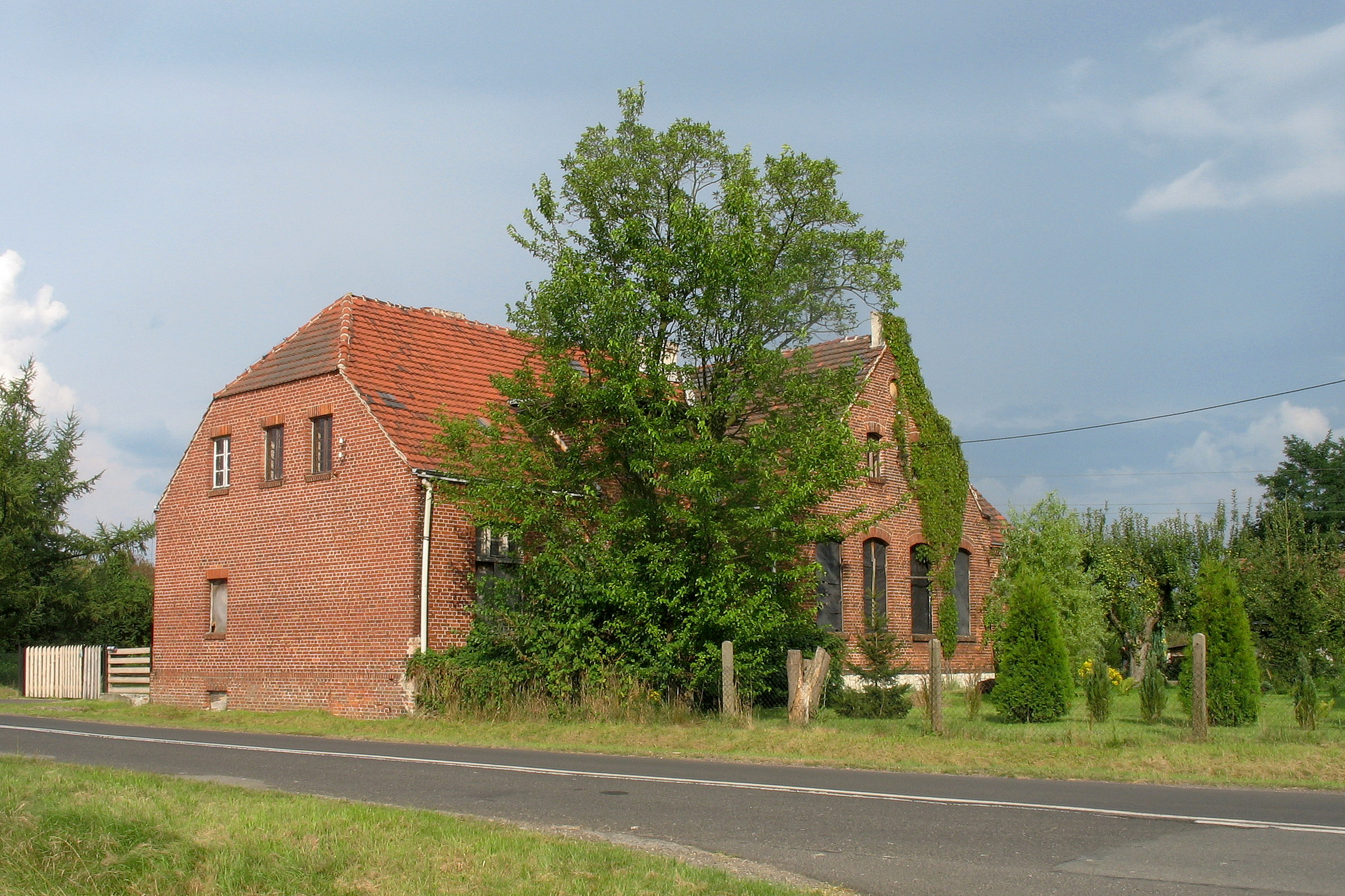 Jasiona. Ulica Pyskowicka.